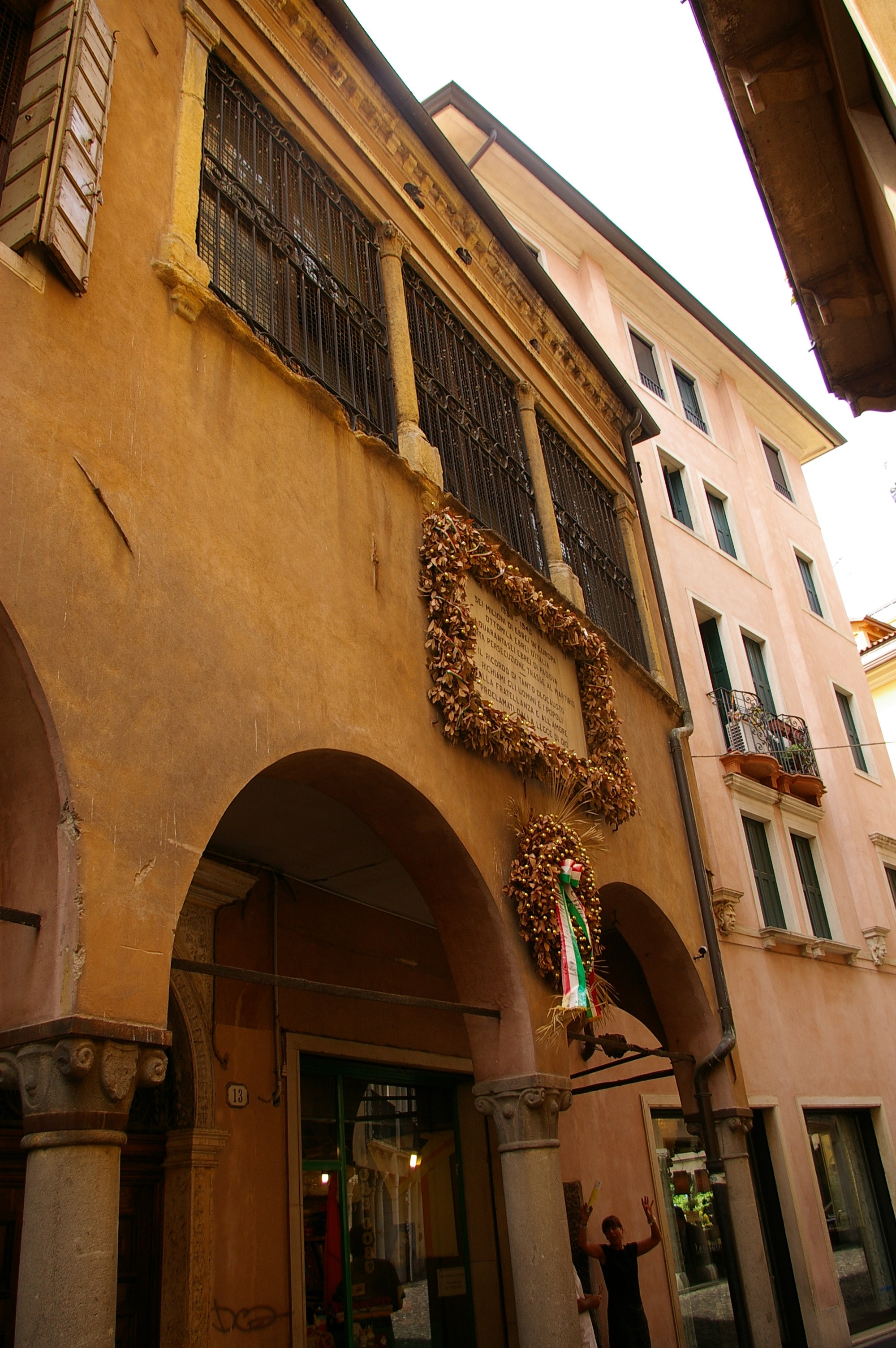 Bâtiment de la synagogue de Padoue (1er étage)